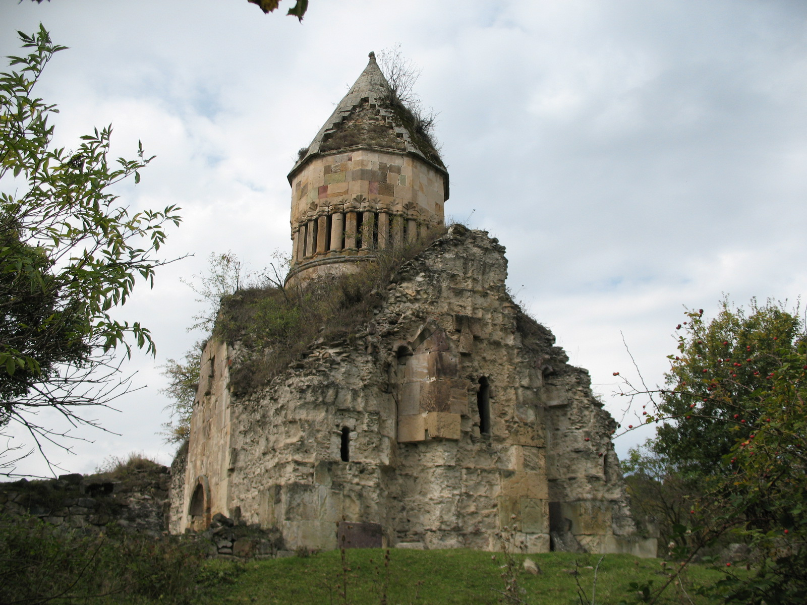 Խորակերտ photo by Armen Geryan 94/12